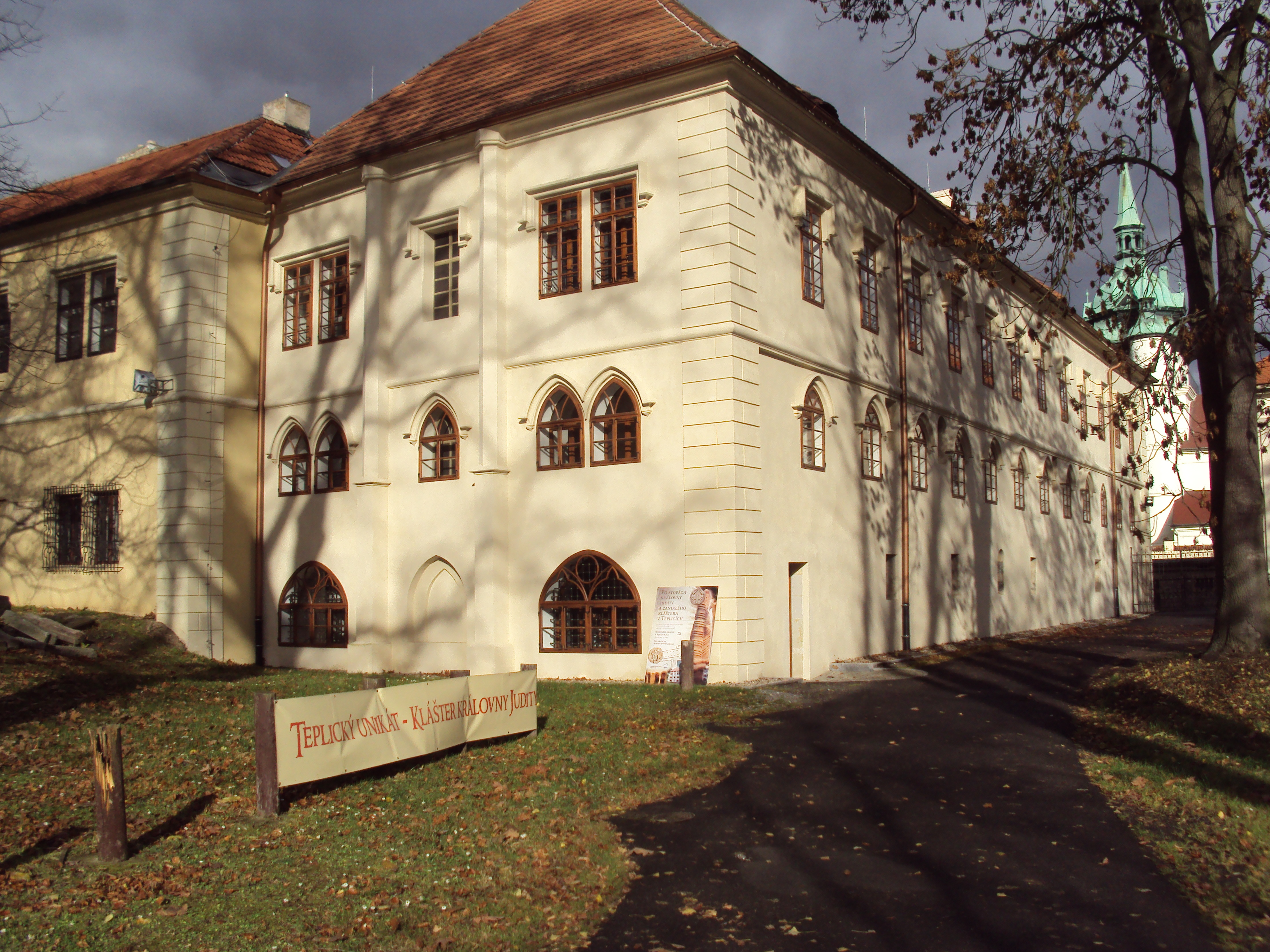 V areálu teplického zámku je budova Juditina kláštera i s expozicí muzea